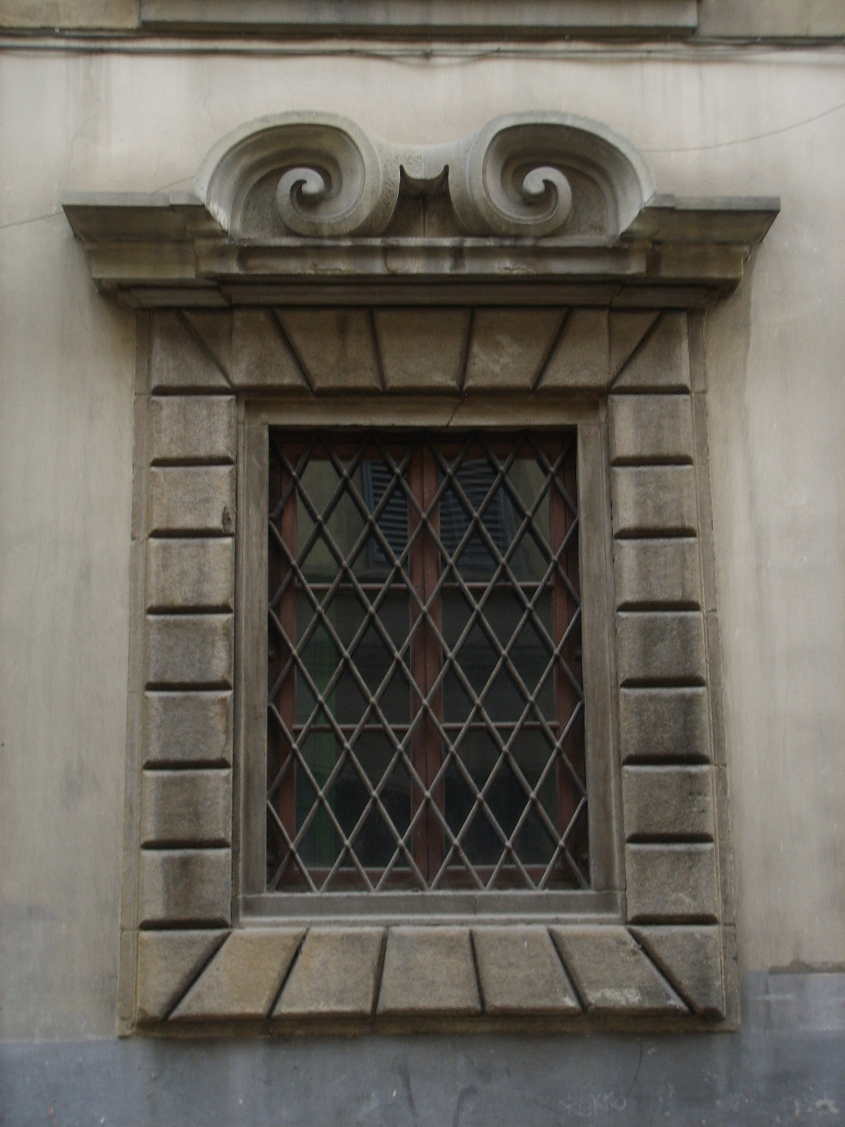 Palazzo guicciardini corsi salviati 04 finestra